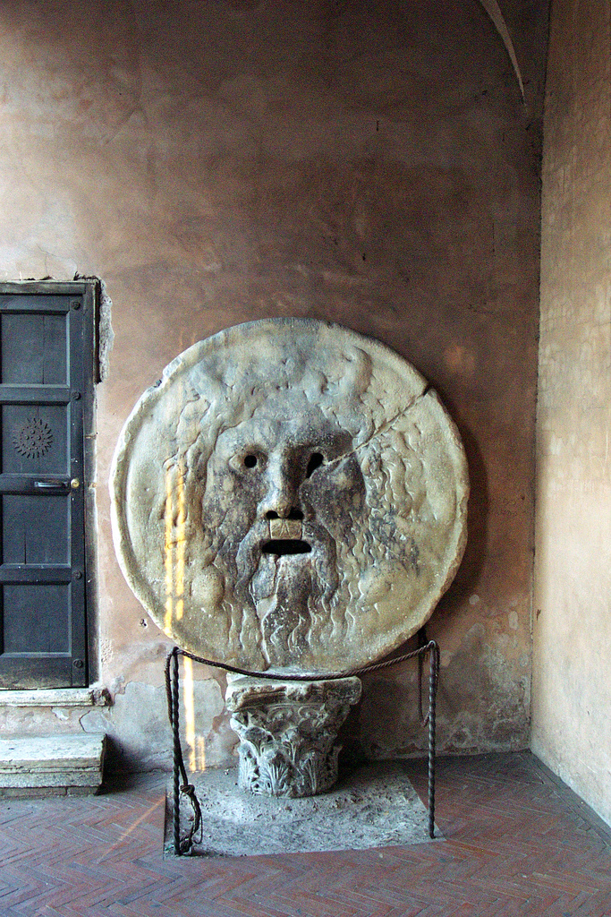 Bocca della Verità a Roma, Italia